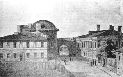 Academia Mihăileană, Iaşi, Moldavia (now Romania)